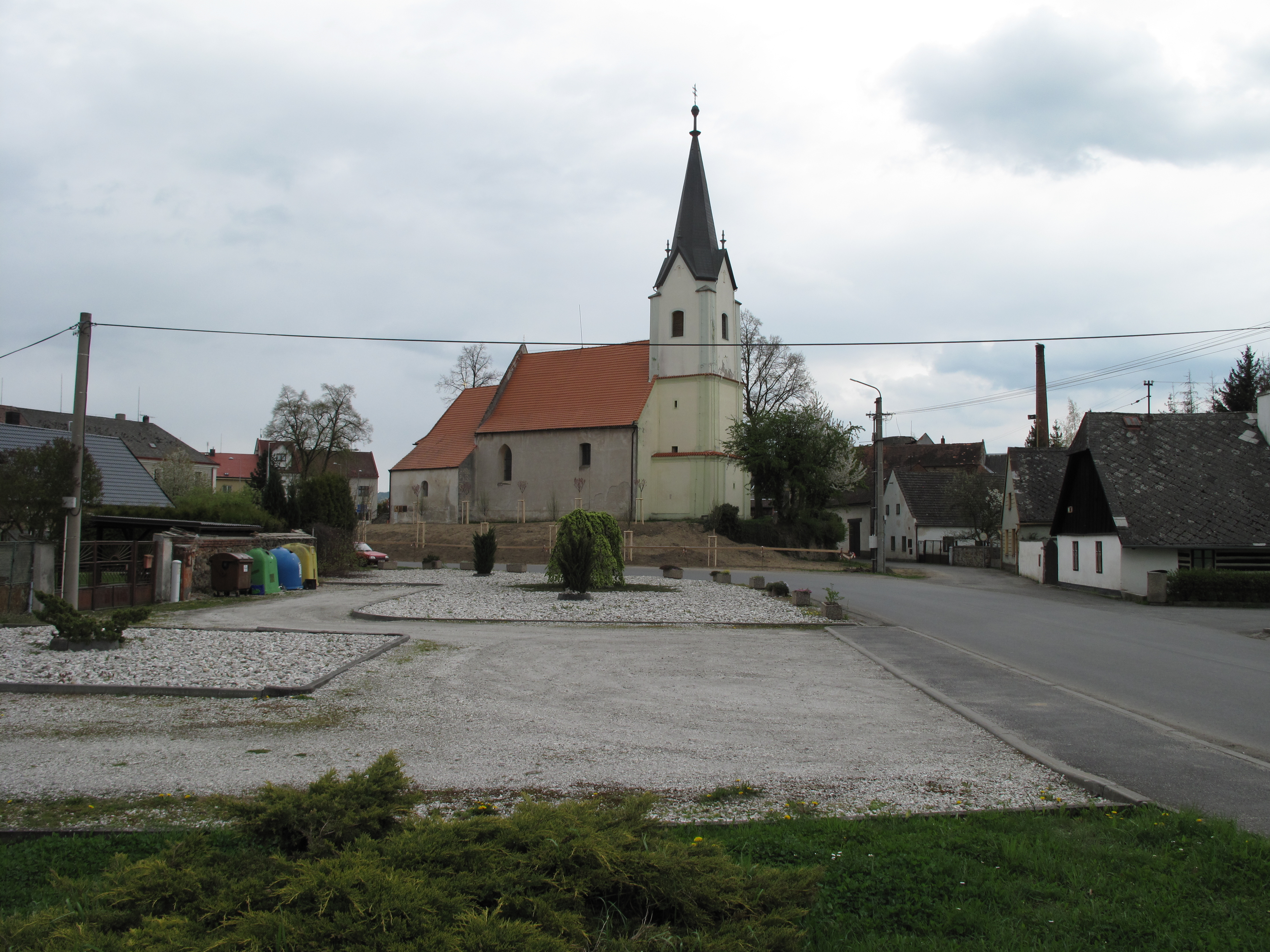 Janovice nad Úhlavou. Okres Klatovy, Česká republika.